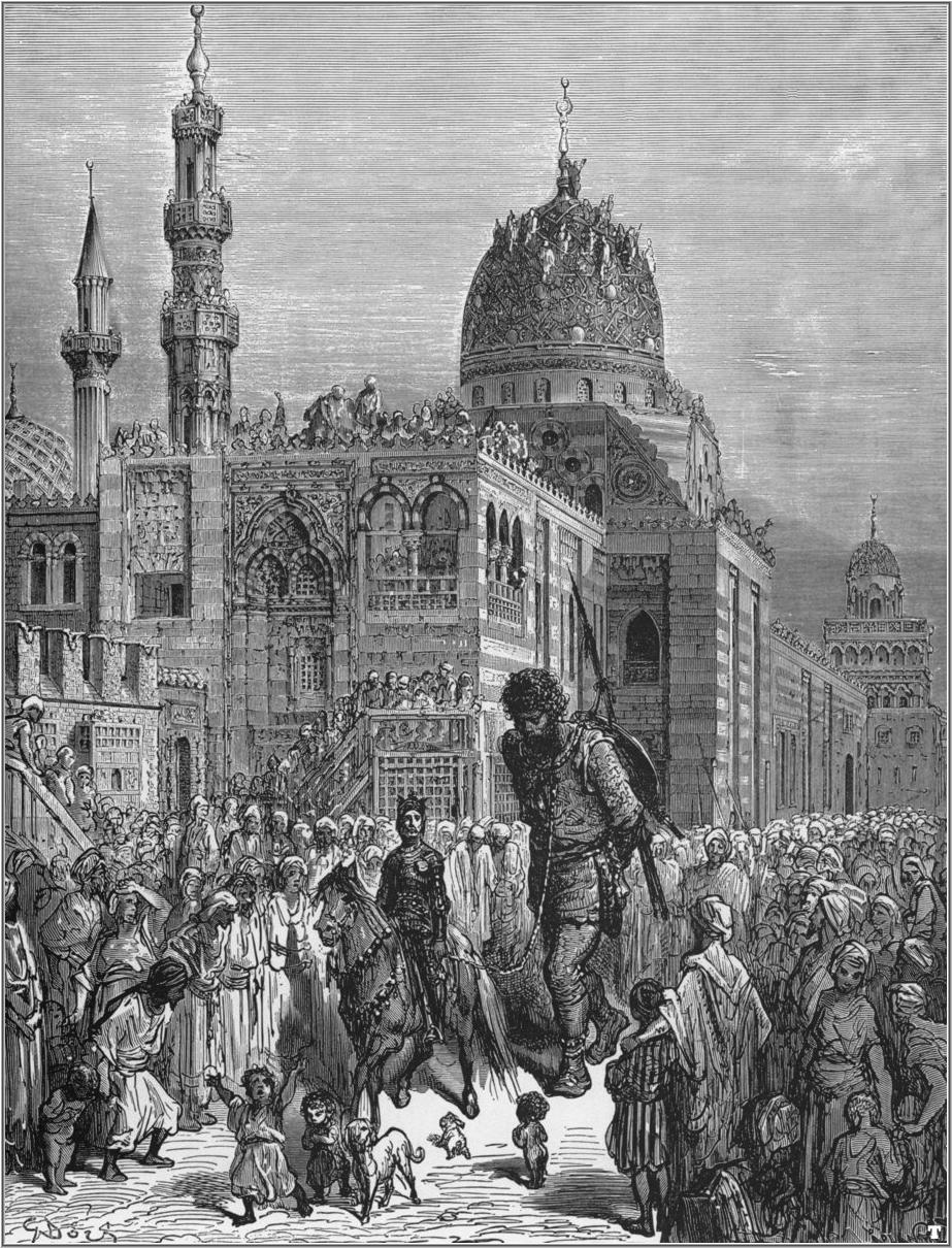 illustration of Ludovico Ariosto’s “Orlando Furioso”.